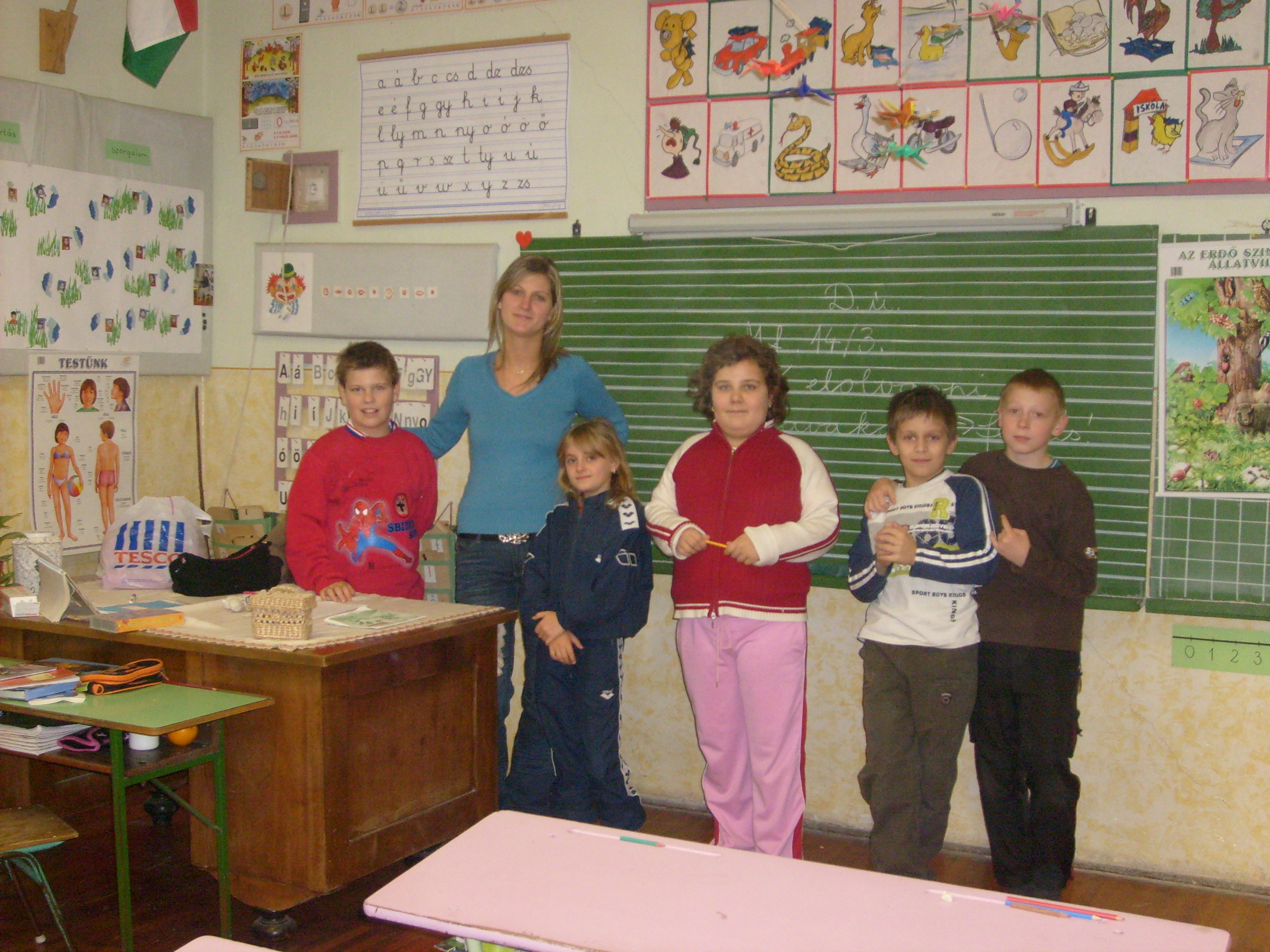 Tanító a diákjaival. A kép a Trefort Ágoston Általános Iskolában készült